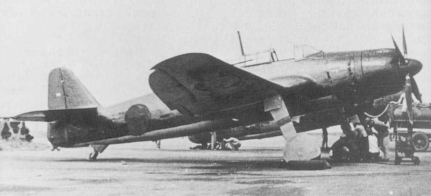 Aichi B7A Ryusei Grace